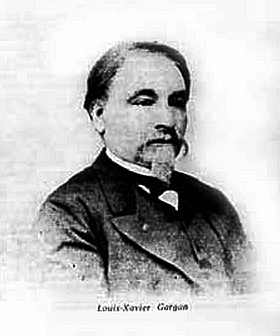 Portrait de Louis-Xavier Gargan (1816-1886)